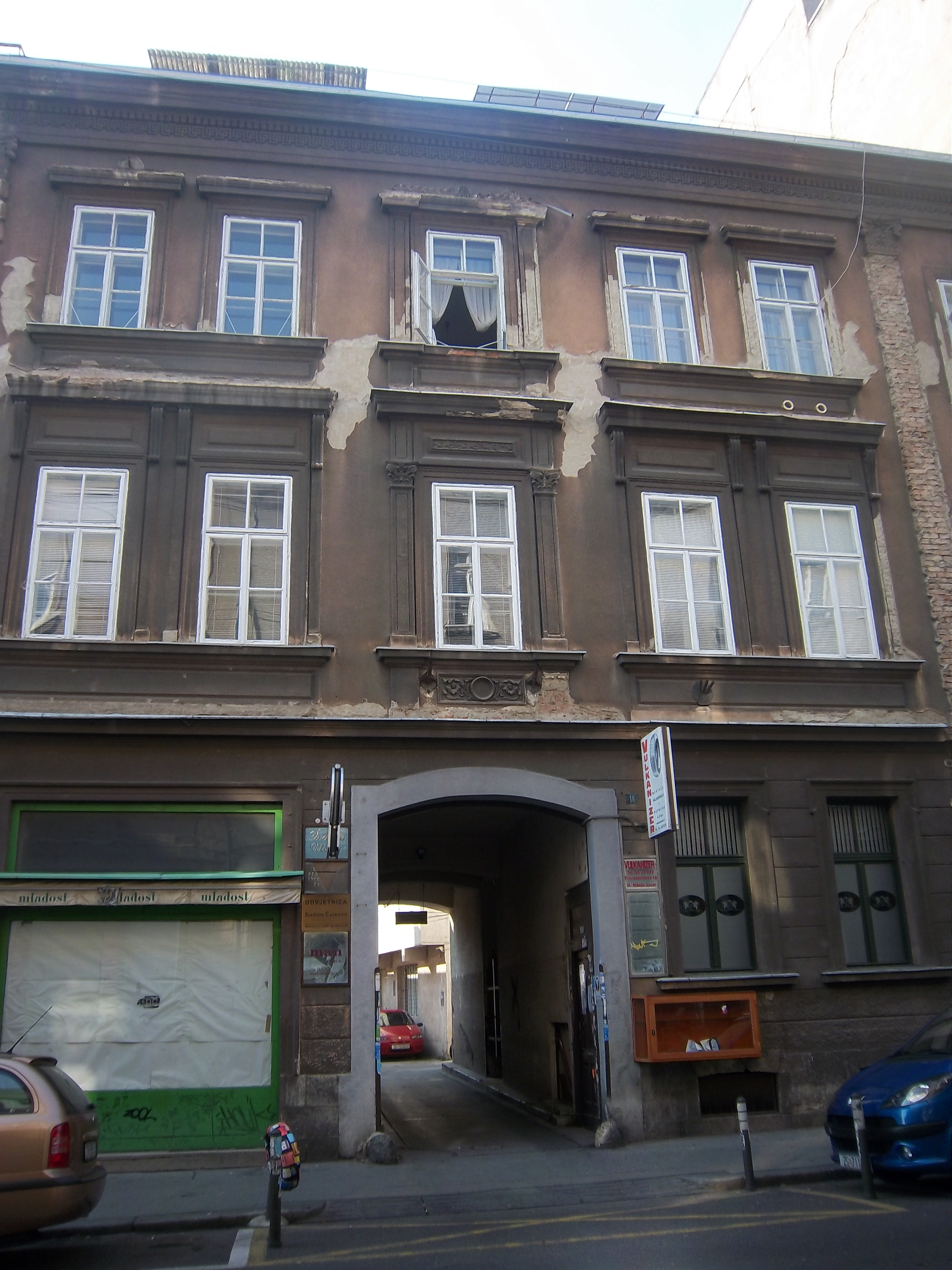 Srpskohrvatski / српскохрватски: Zgrada NVO Privrednik u Zagrebu